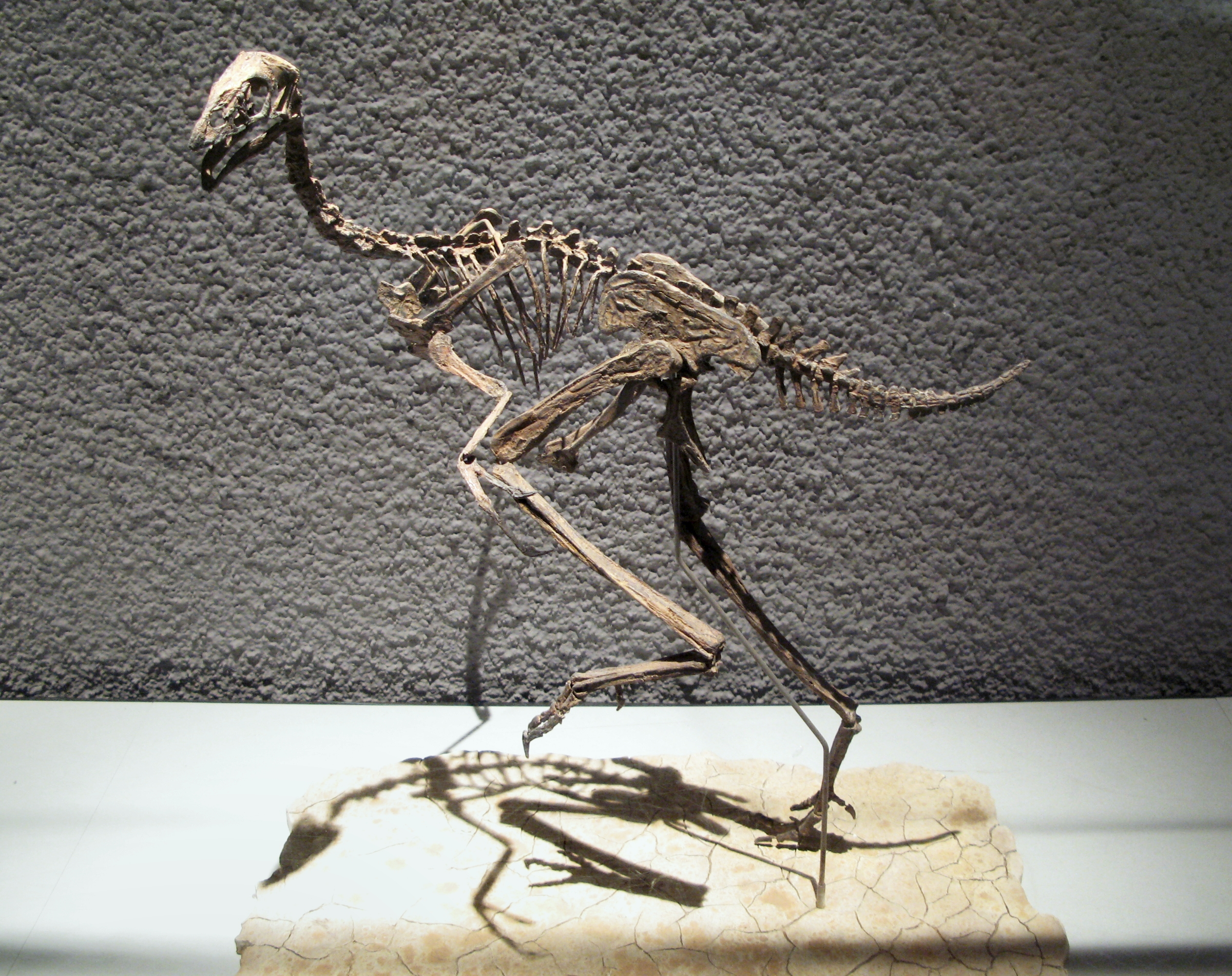 Caudipteryx zoui, Skelett - Untere Kreide - Liaoning/China - aufgenommen im Museum am Löwentor, Stuttgart